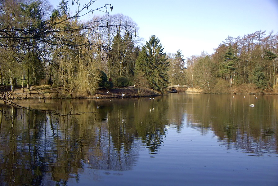 Bürgerpark in Bremerhaven von Uwe H. Friese 2002 selbst fotografiert.